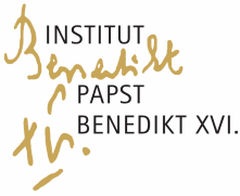 Logo